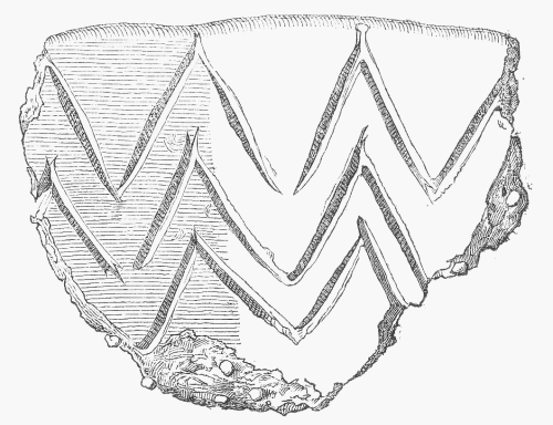 Randscherbe einer Schale der Trichterbecherkultur aus dem zerstörten Großsteingrab Mestlin 1